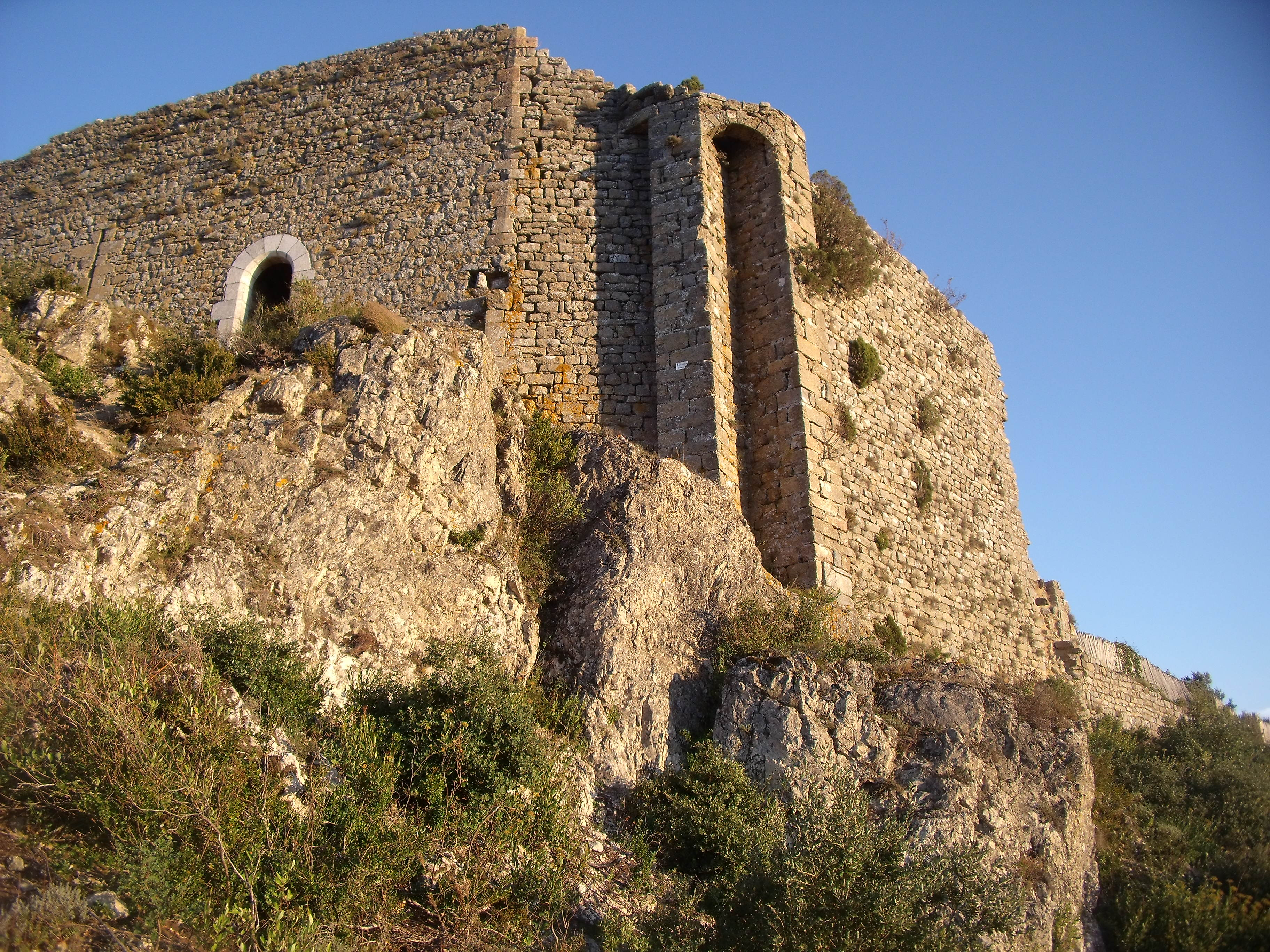 Photo de soirée prise depuis les abords du château, sur la crête au nord, coté gorges du Termenet. .